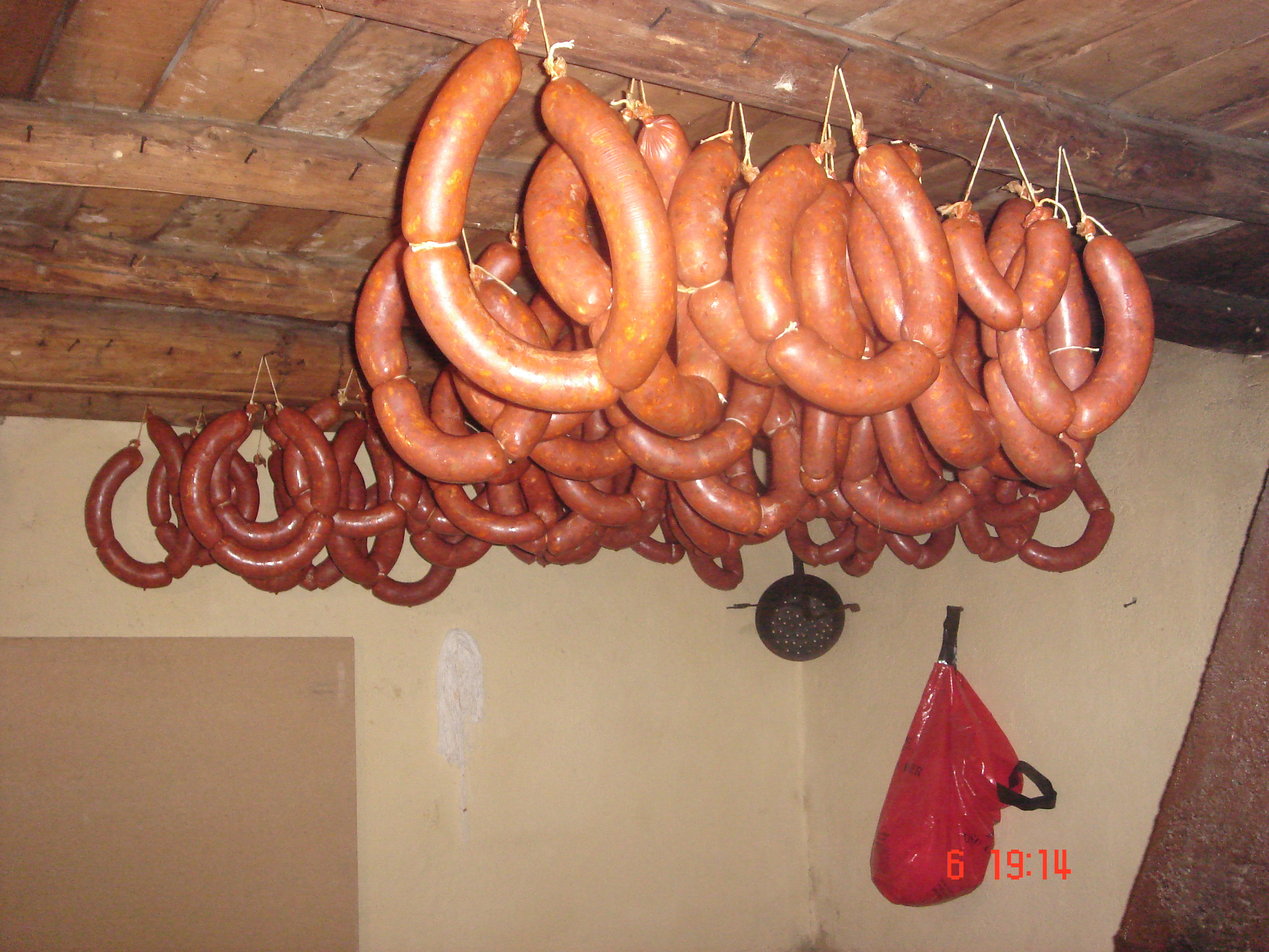 Matanza propia